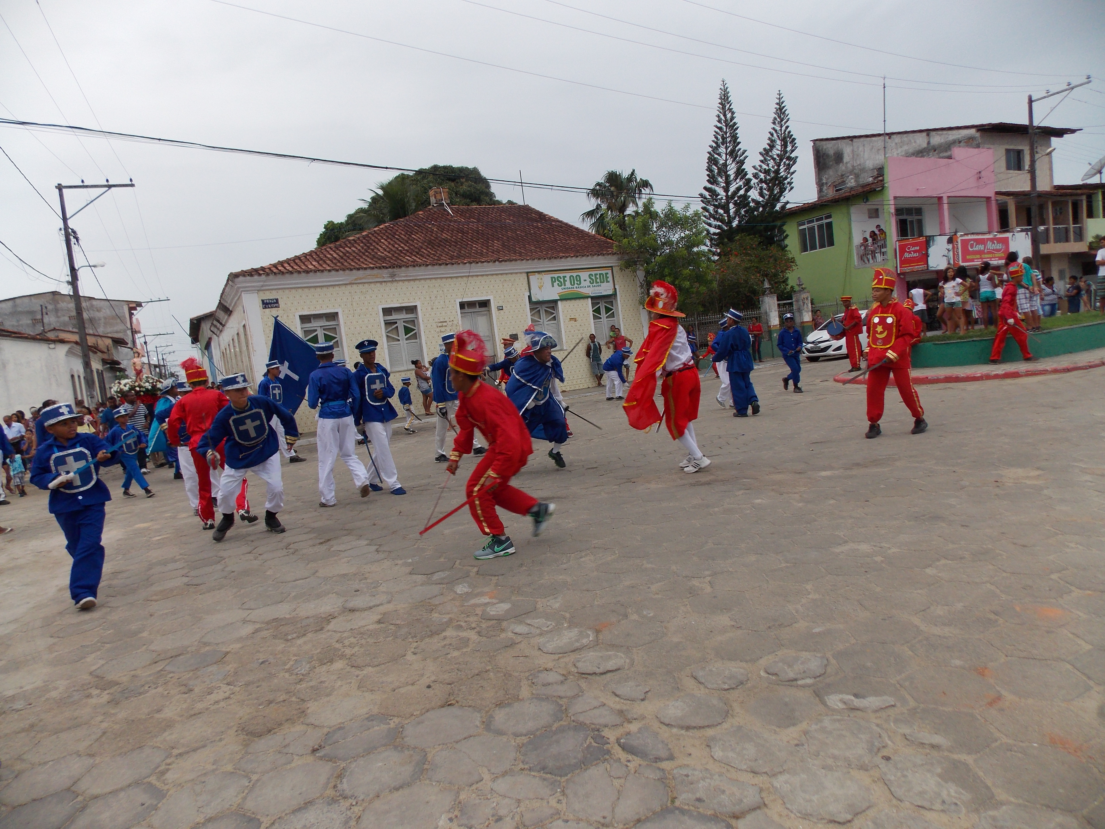 bssbbnd